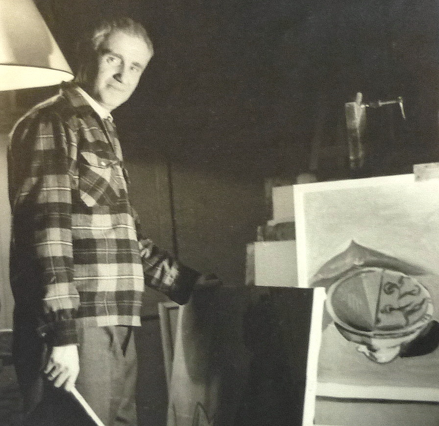 Il s'agit d'une photo de famille que je suis seule à posséder où l'on voit mon père Antoine Irisse devant son chevalet et ses toiles.